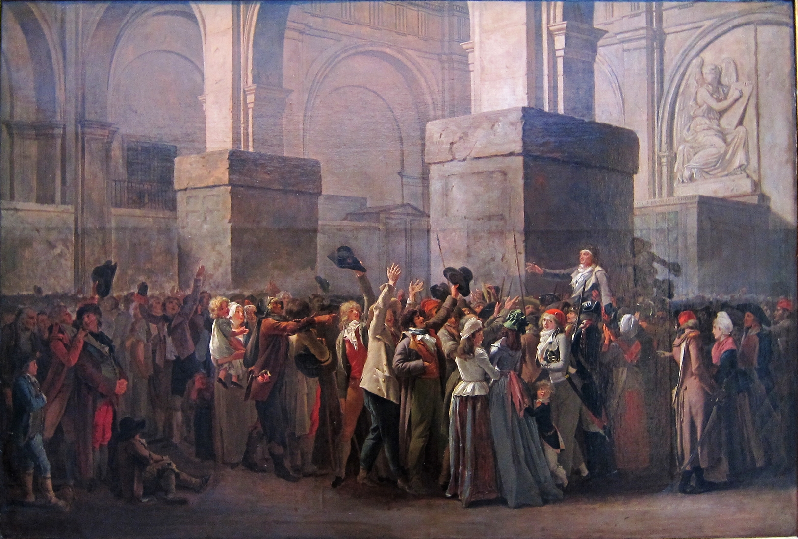 Le triomphe de Marattitle QS:P1476,fr:"Le triomphe de Marat" label QS:Lfr,"Le triomphe de Marat"